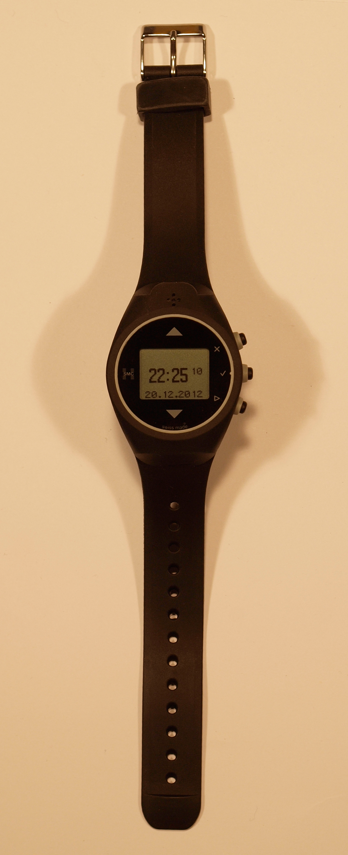 Radiocontrol-Armbanduhr